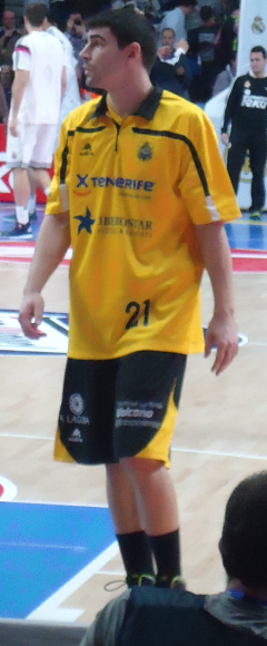 Partido Real Madrid-CB Canarias, marzo 2015